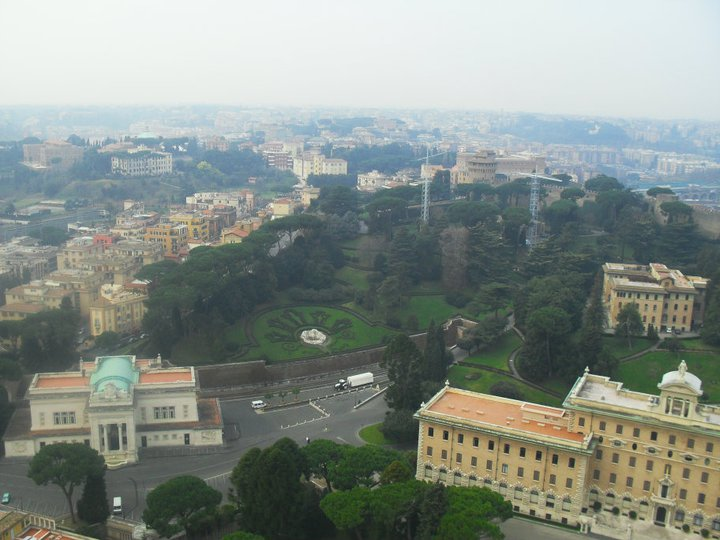 Ciudad del Vaticano - Vaticano, Roma -Italia